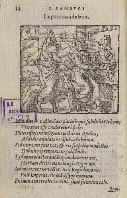 Importuna adulatio, página de los Emblemata, et aliquot nummi antiqui operis de Johannes Sambucus, Cristóbal Plantino, Leiden, 1584 (4ª ed,). Apeles pintando el retrato de Alejandro Magno